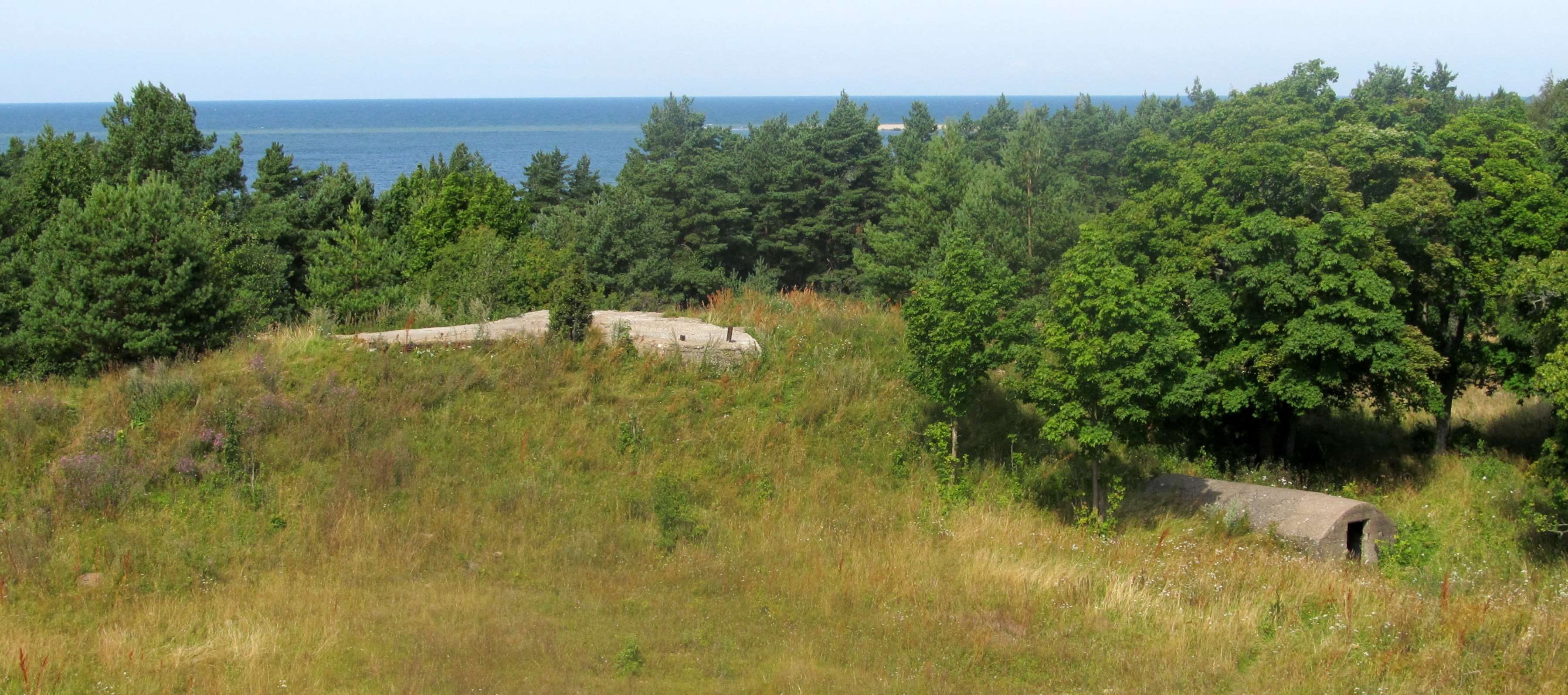 Ristnas asuv NSVL sõjaväe prožektorimägi